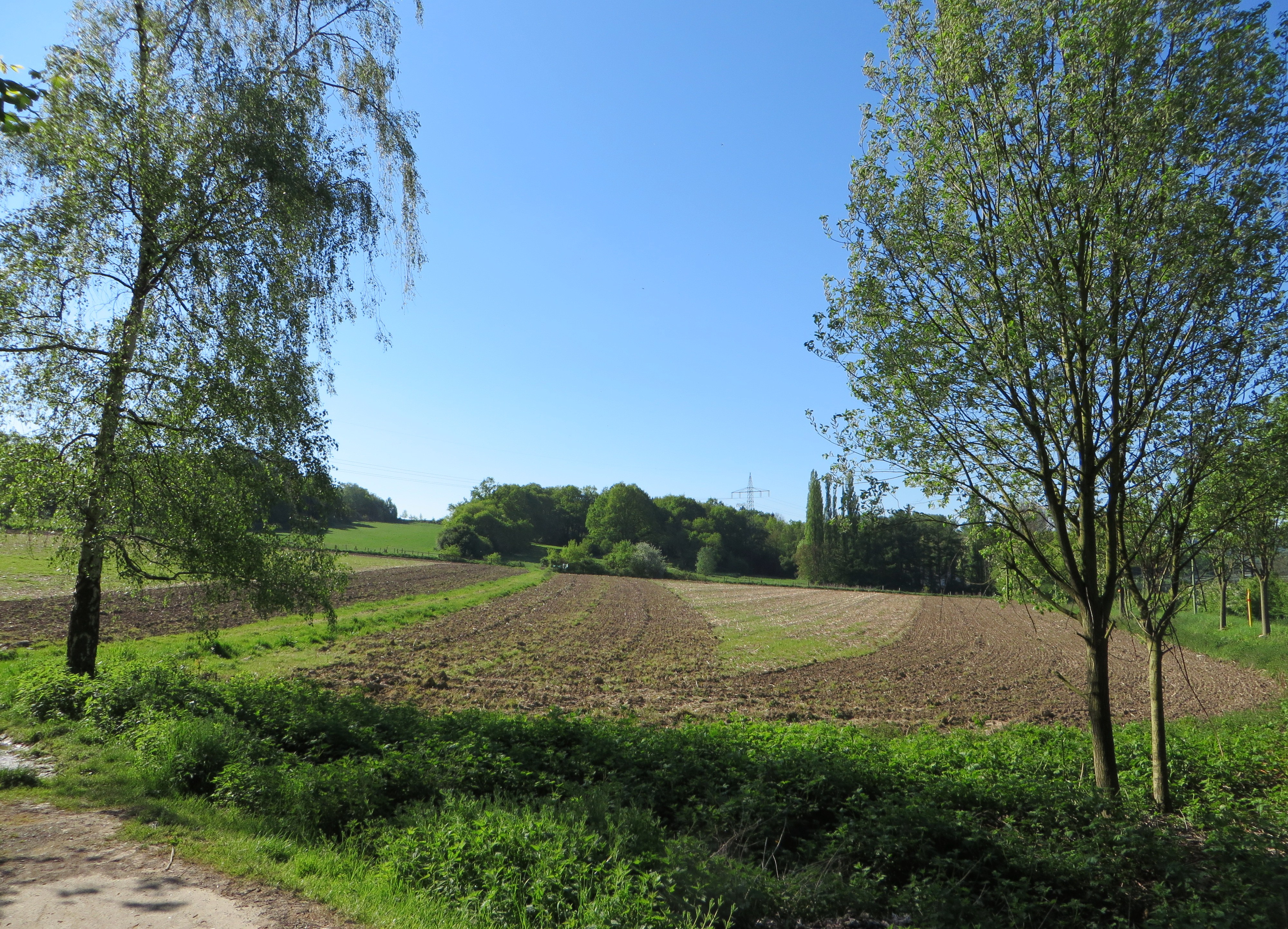 Landschaftsschutzgebiet „Hilgenland“ in Hagen-Boele, zwischen Niederhofstraße, A 1 und dem Friedhof am Hilgenland. Feld-, Weide- und Waldgebiet. Das Foto zeigt den Bereich „Meinacker“.